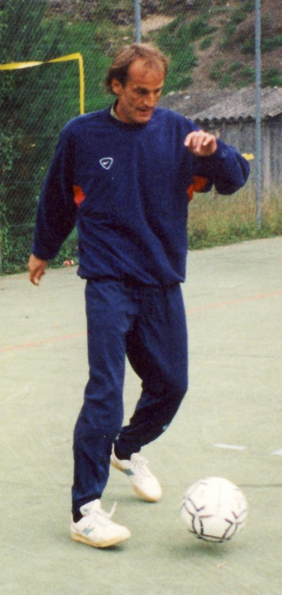 Echauffement lors d'un match amical à Vermes (JU)